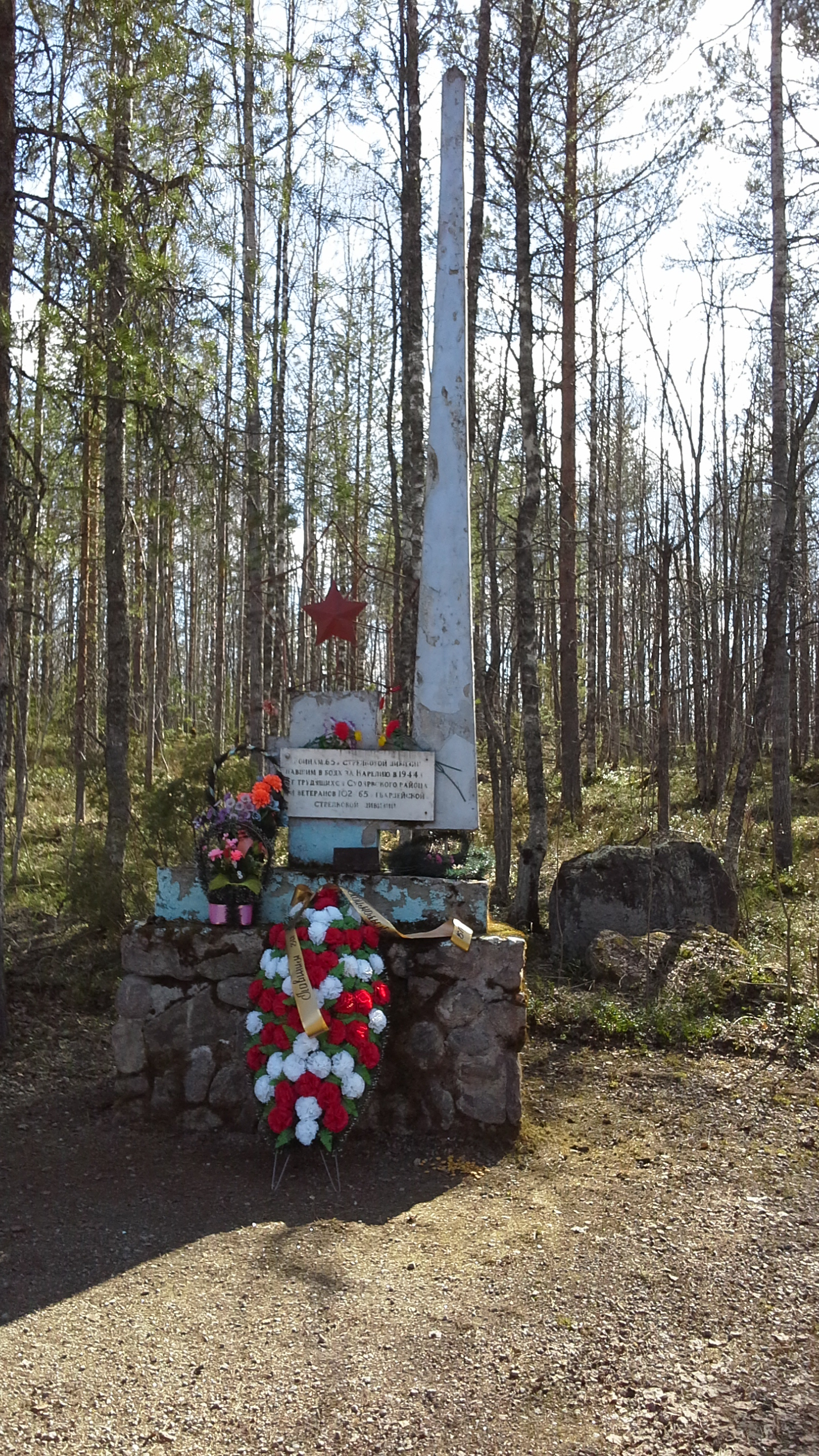 Обелиск на высоте Чёрная, 30-й километр шоссе Суоярви — Лоймола.